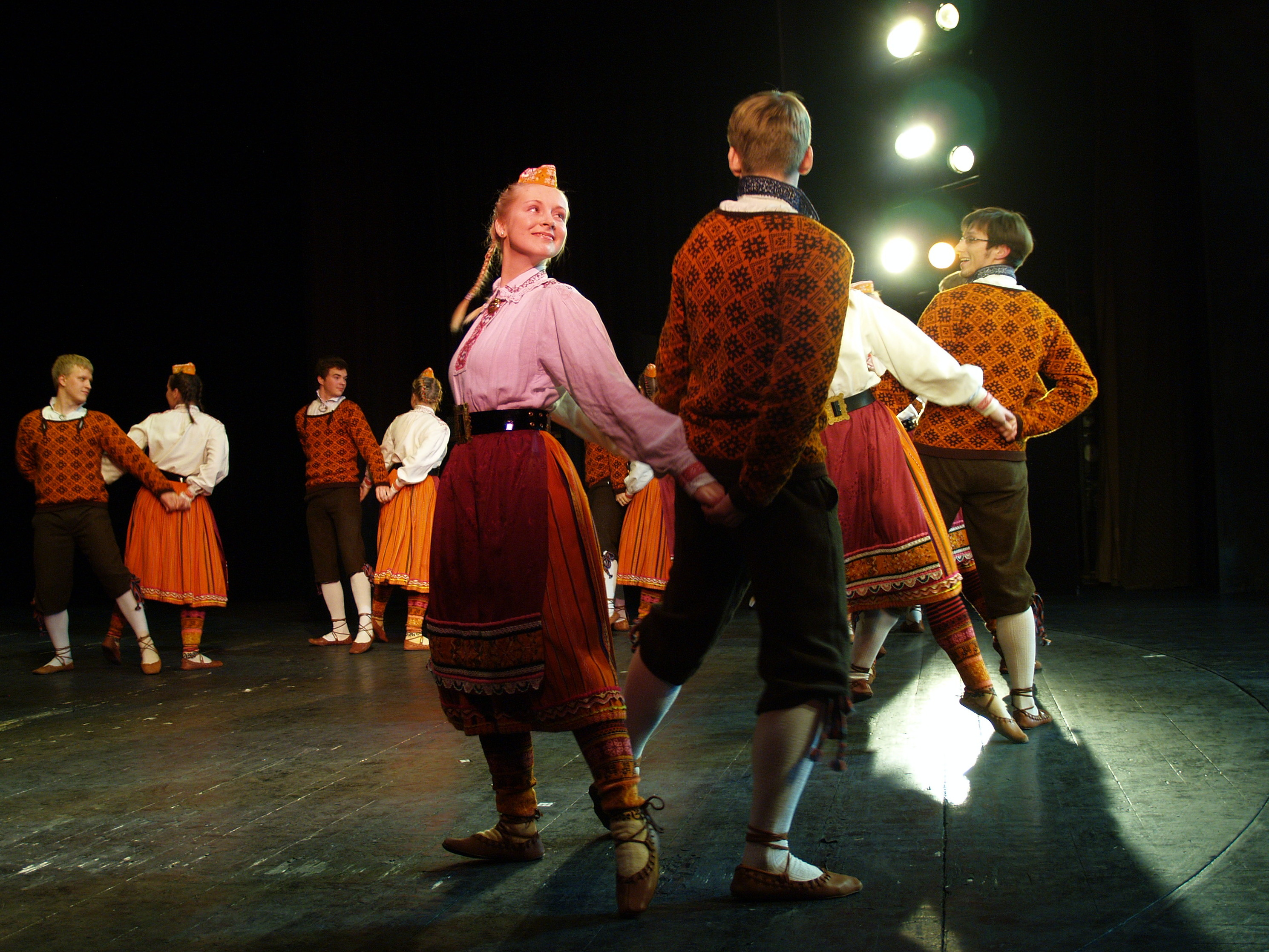 Tartu Ülikooli Rahvakunstiansambli ja Läti Ülikooli Rahvatantsuansambli "Dancis" ühiskontsert Vanemuise suures majas 3. detsembril 2011. Vanem segarühm esitamas tantsu "Kodukotus". Muhu rahvarõivad.